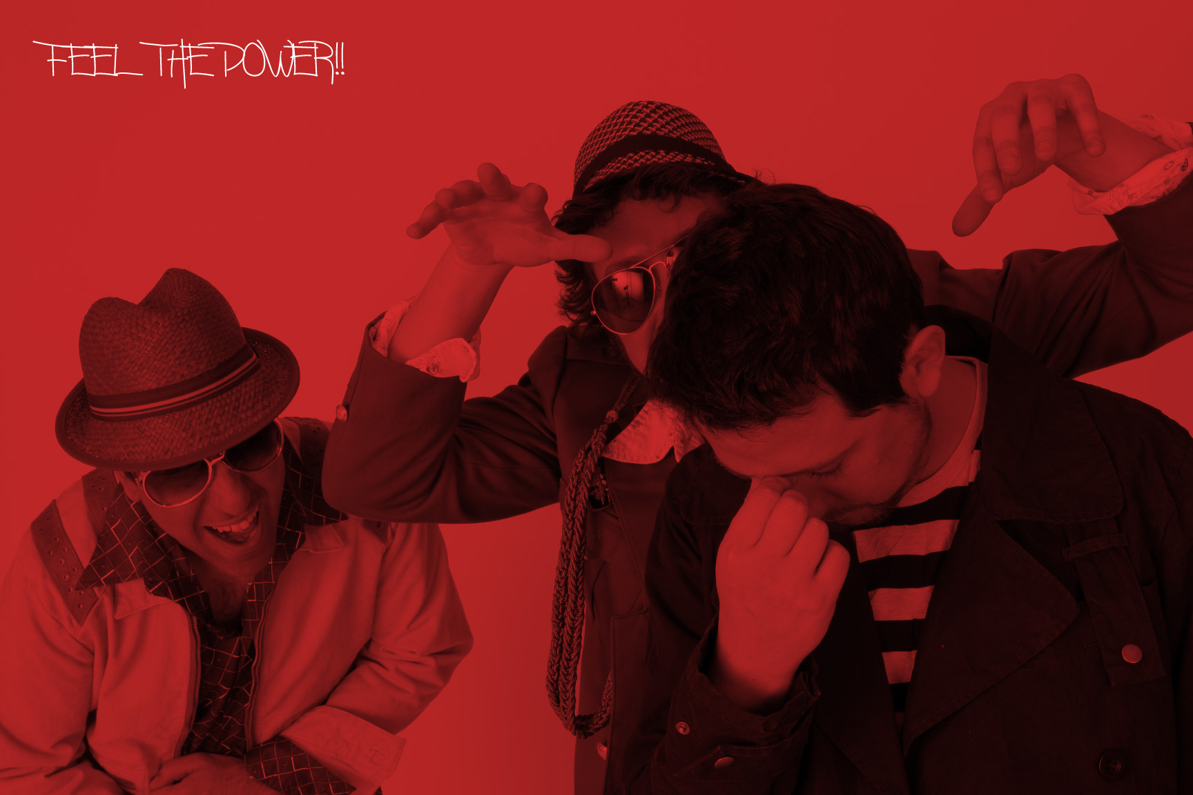 Mandalas